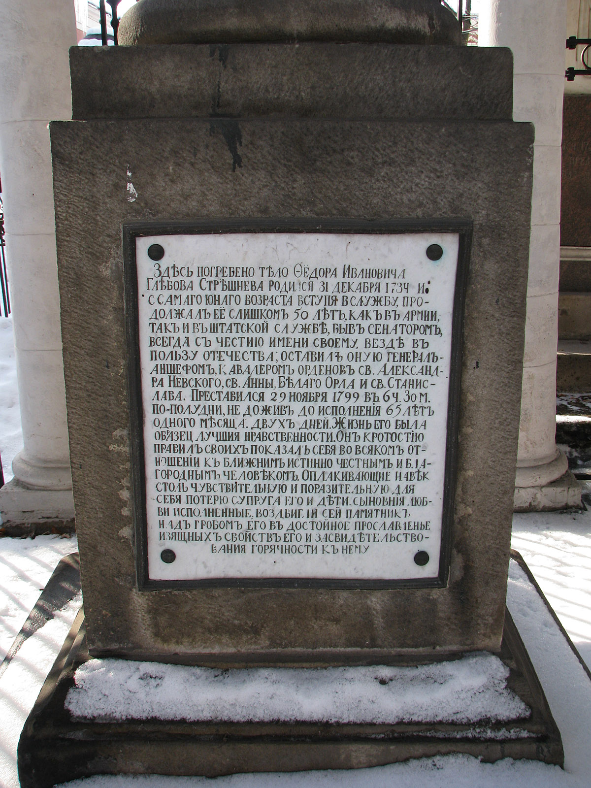 Надгробие 1799 года - Донской монастырь. Употреблена буква Ё.